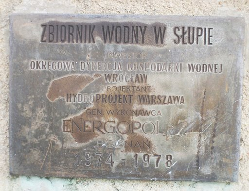 Tablica pamiątkowa budowy zbiornika Słup